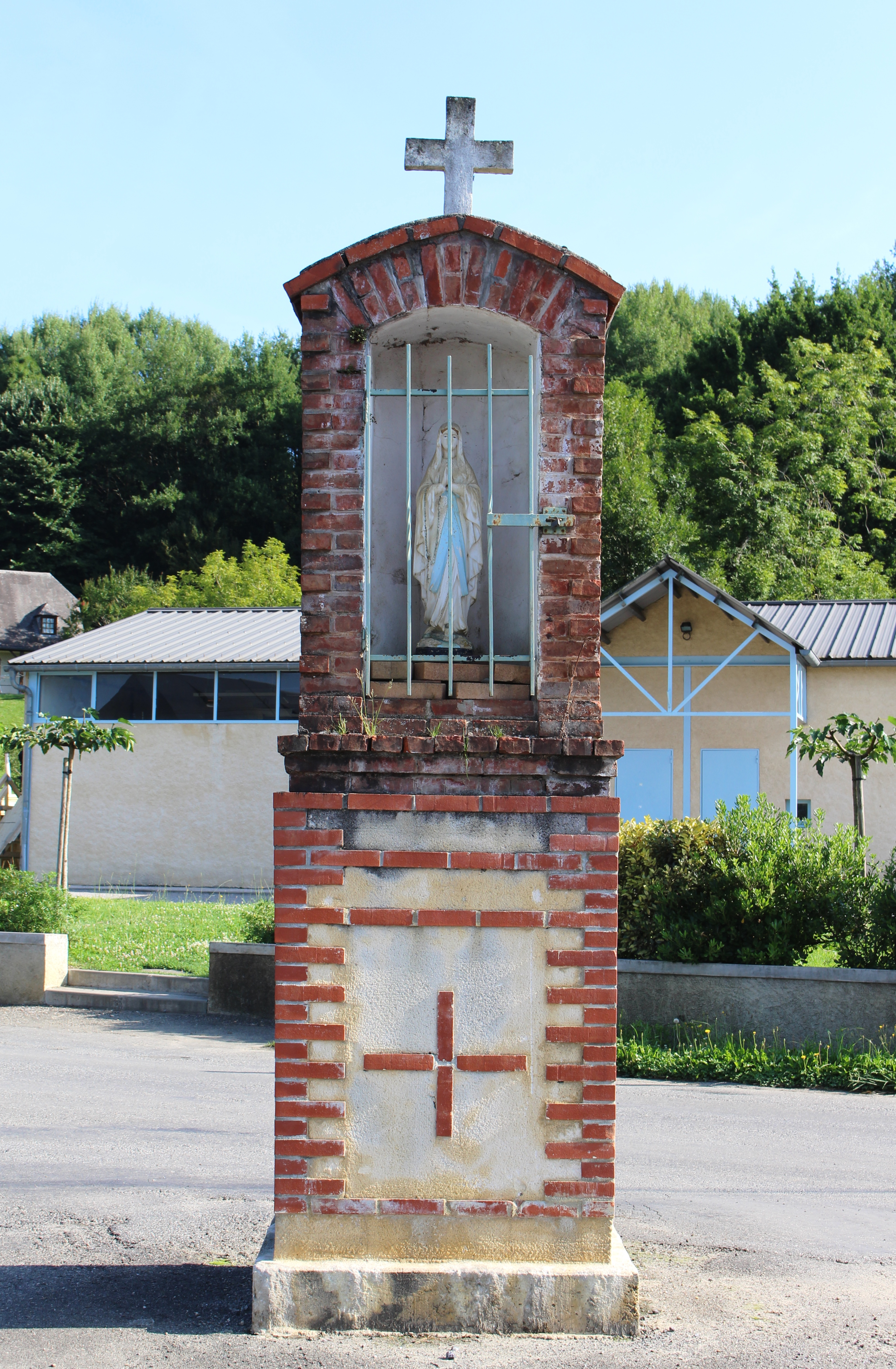 Oratoire de Hibarette (Hautes-Pyrénées)